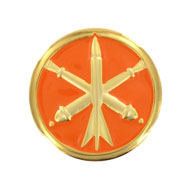 Insigne de collet du Groupe Géographique.